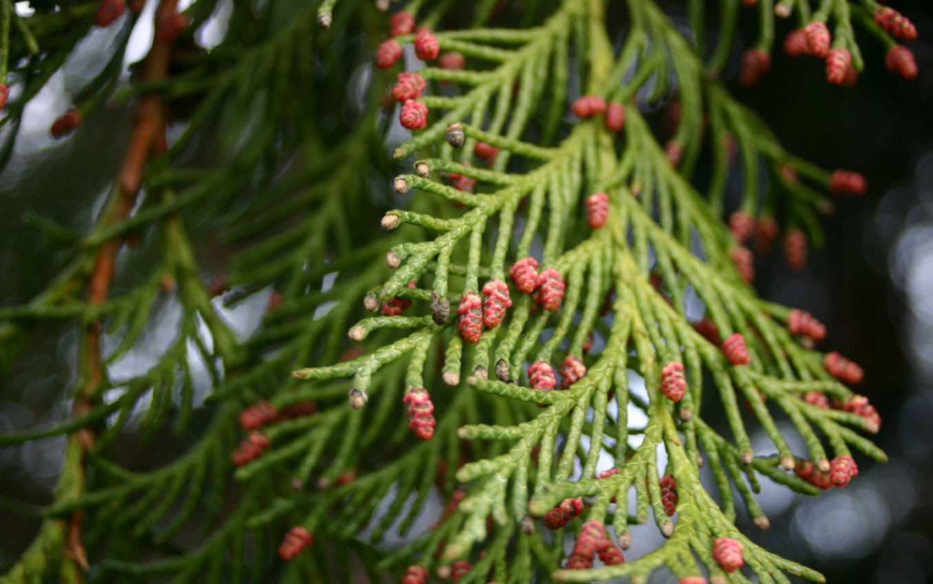 Chamaecyparis lawsoniana: Female Male (pollen) cones